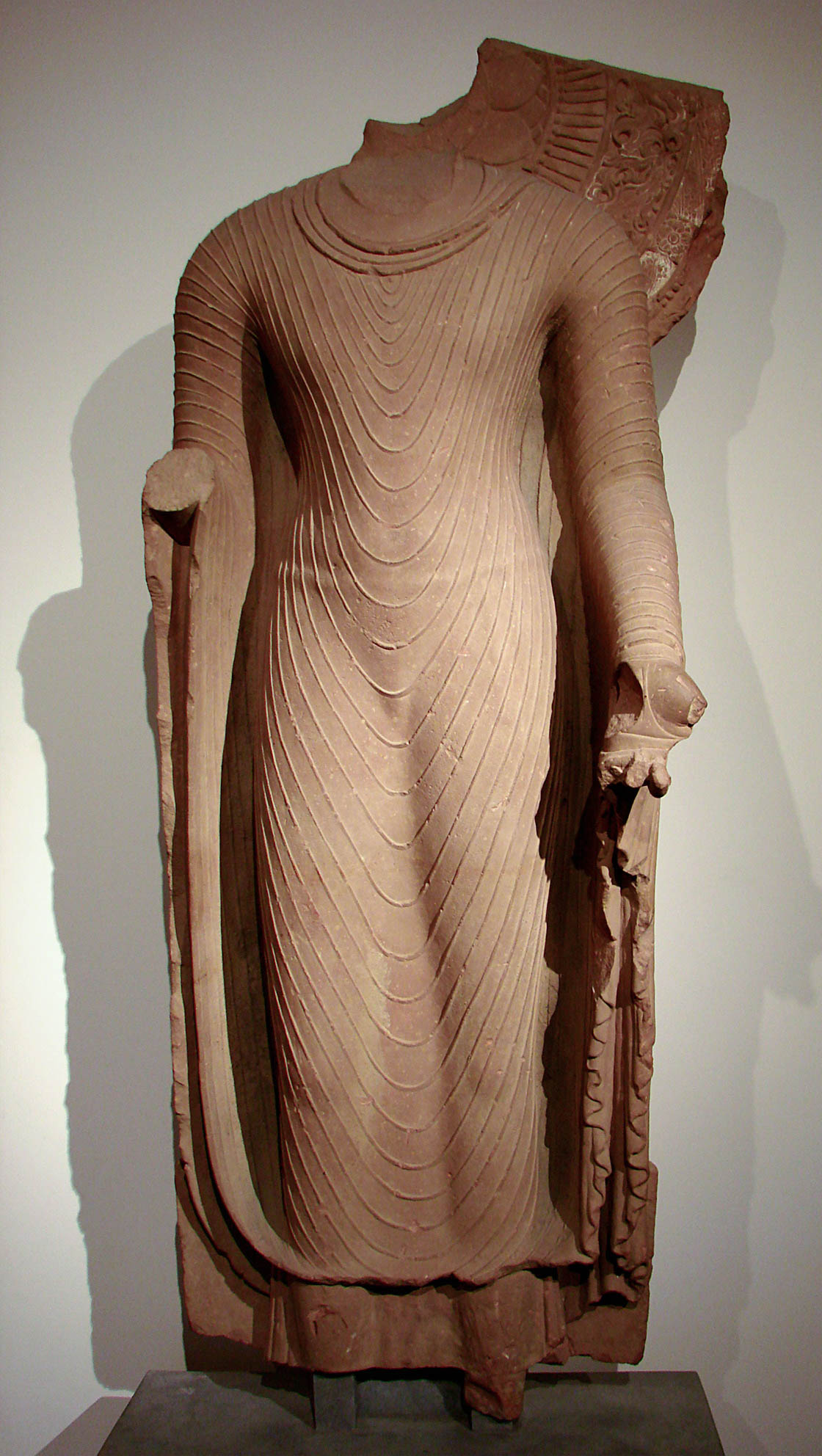 Torse de Buddha. Inde du nord, Uttar Pradesh, Mathura. Époque Gupta,première moitié ou milieu du Ve siècle. Ronde bosse. Grès beige. H. 142 ; L. 54 cm. Musée Guimet, Paris. [1] page sur le site du musée.